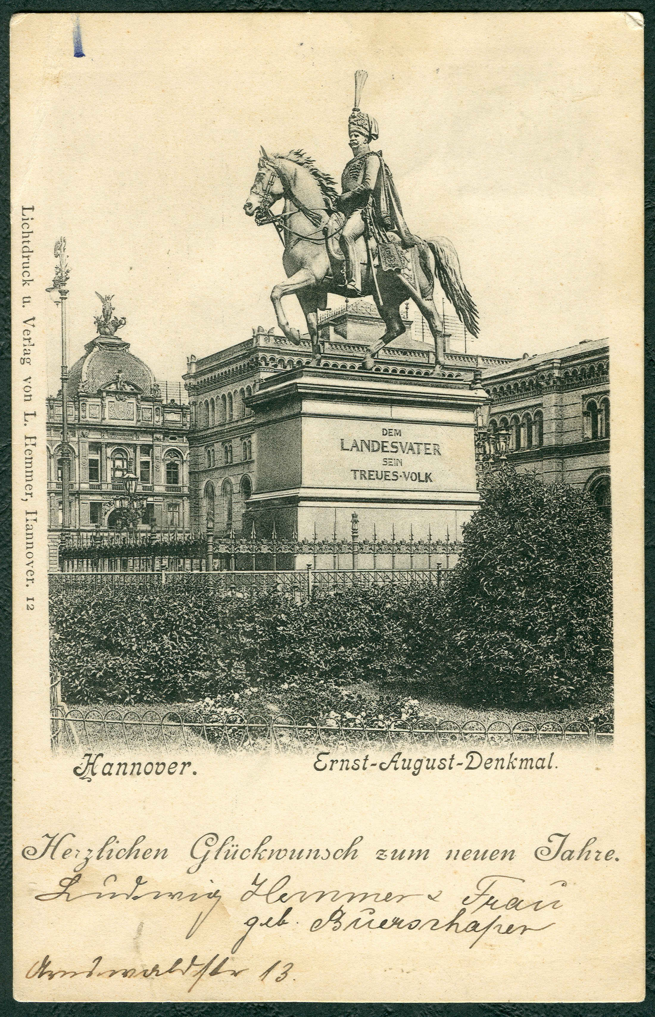 Seine Ansichtskarte mit der laufenden Nummer 12 und dem umzäunten und begrünten Ernst-August-Denkmal hatte der Verleger Ludwig Hemmer in diesem Fall mit dem Zudruck "Herzlichen Glückwunsch zum neuen Jahre" versehen. Erst beim Einscannen der Karte aus der Sammlung von Rainer Hoffschildt wurde die Original-Unterschrift von Ludwig Hemmers Ehefrau, geborene Buerschaper entdeckt und die Wohnanschrift des Ehepaares in der Arnswaldstraße 13. Der umseitige Adressat, Herr August Reese und Familie, die sich zum Jahreswechsel eines noch unidentifizierten Datums (wohl aufgrund des missglückten Versuchs, die aufgeklebte Briefmarke durch bloßen Abriss für die eigene Sammlung zu sichern) in Herzberg am Harz aufhielt, ist ein Indiz für für eine mögliche Kooperation zwischen der Fotografen-Familie Reese und der Verleger-Familie Hemmer ...